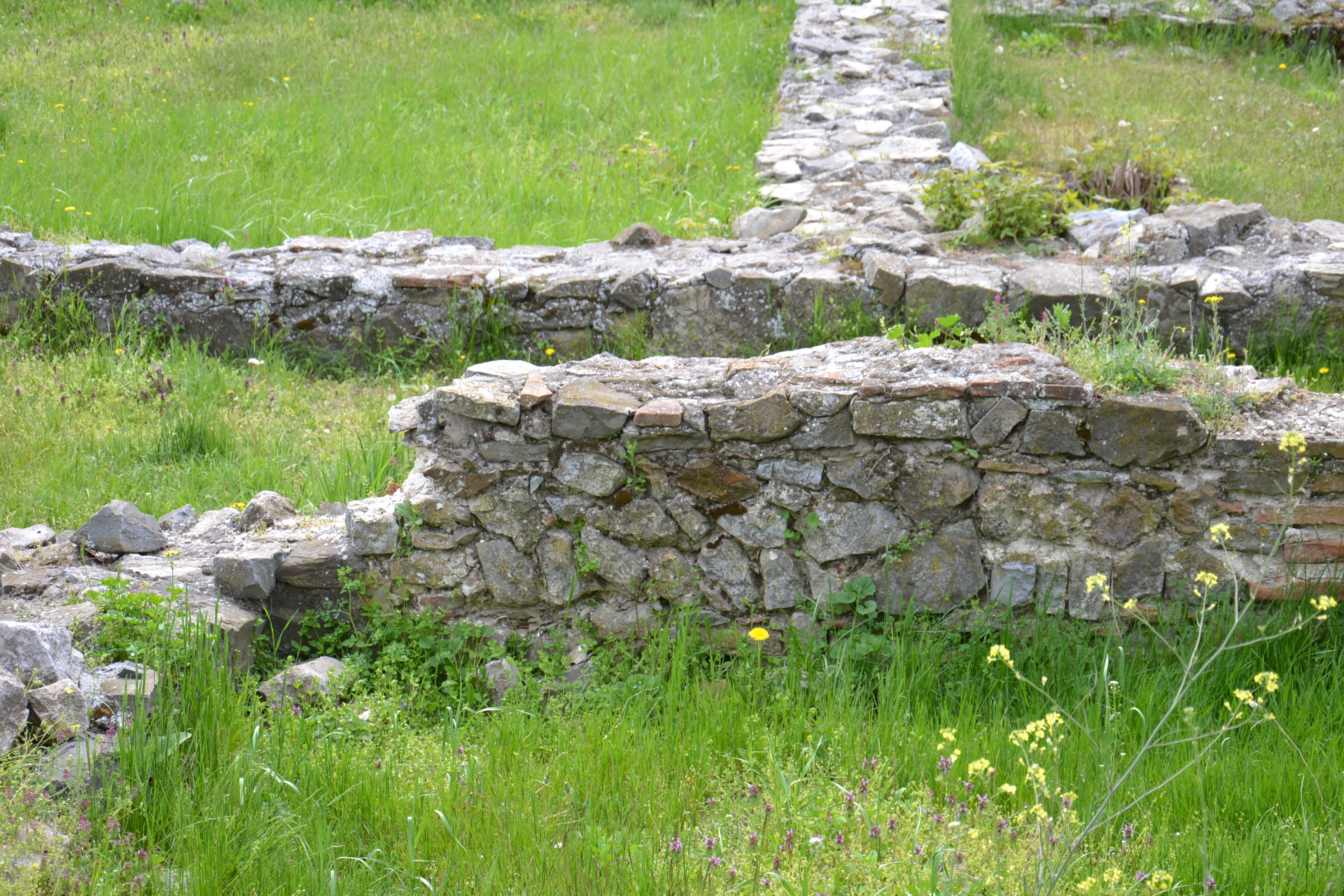 Situl arheologic "Aegyssus"